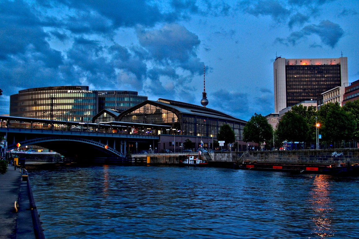 Der Bahnhof Friedrichstraße im AbendlichtThis is a photograph of an architectural monument.